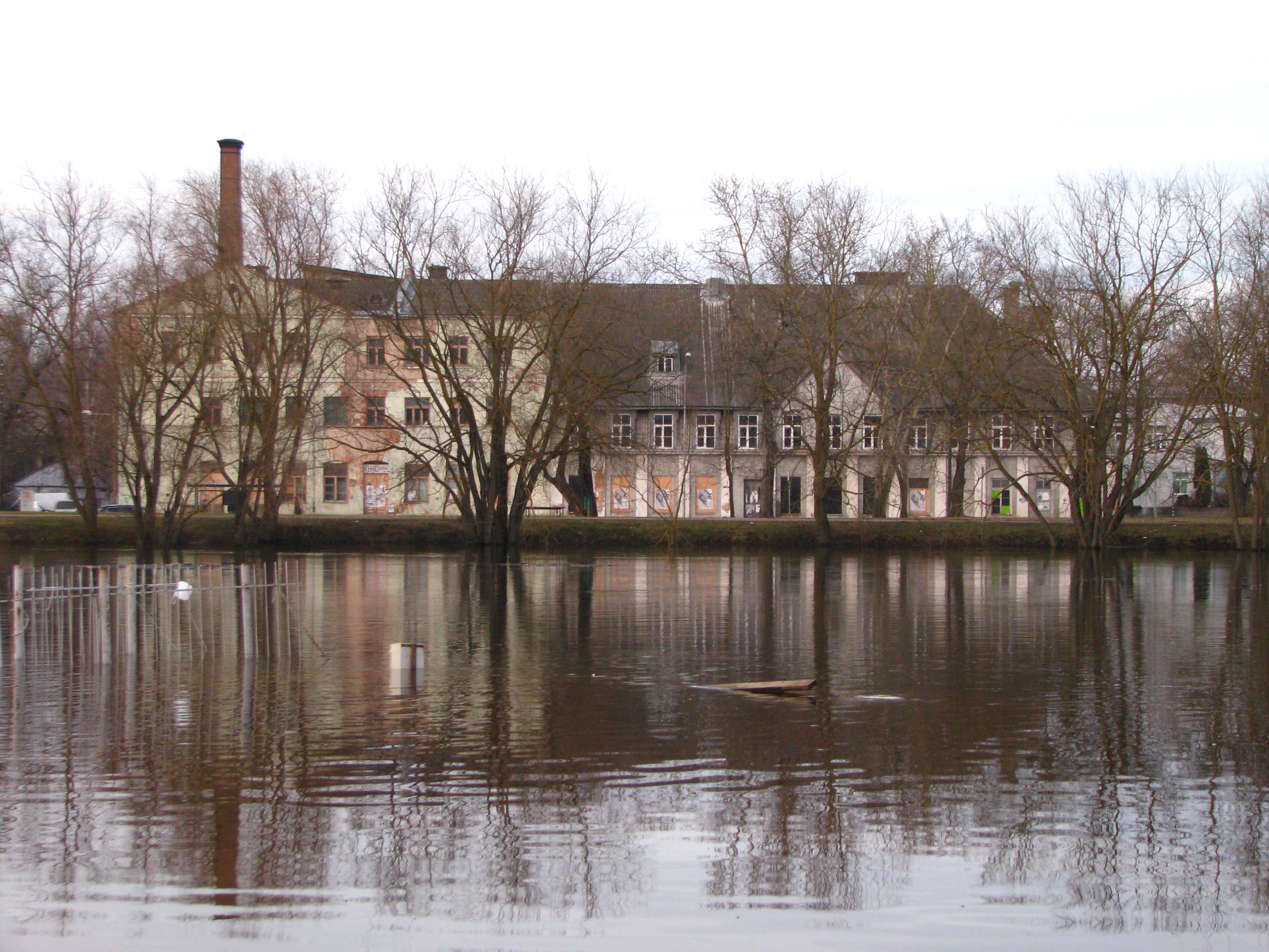 Tartu Pärmivabrik